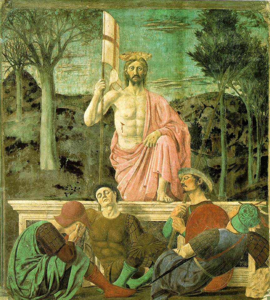 Resurrection (Piero della Francesca, 1463)